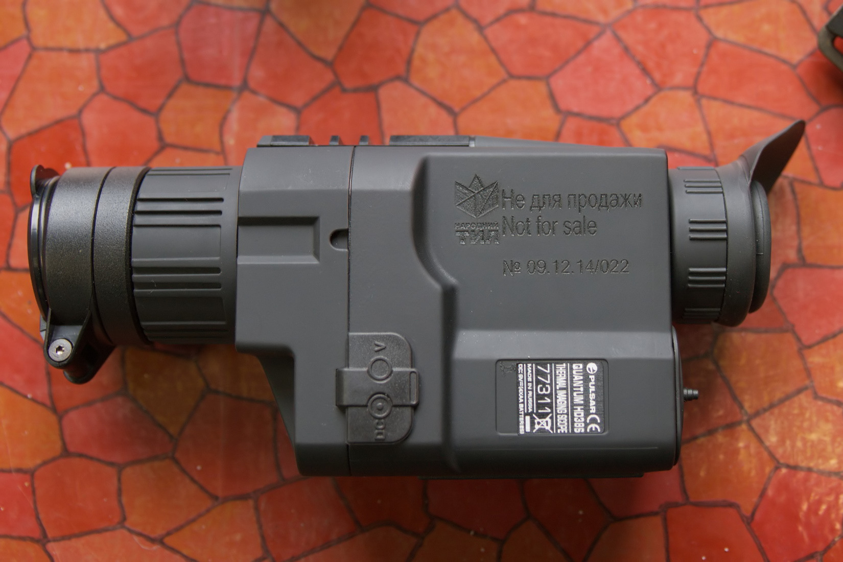 Тепловізор, закуплений волонтерською організацією Народний тил